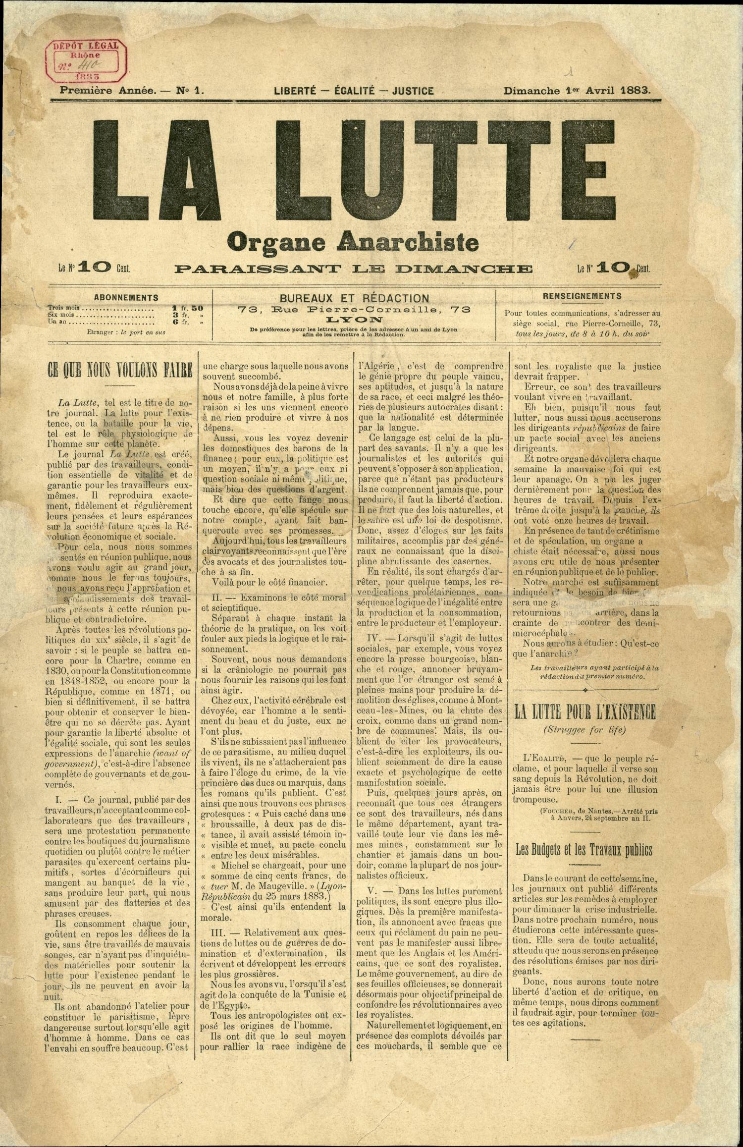 La Lutte, organe anarchiste : 19 numéros publiés entre avril et août 1883.